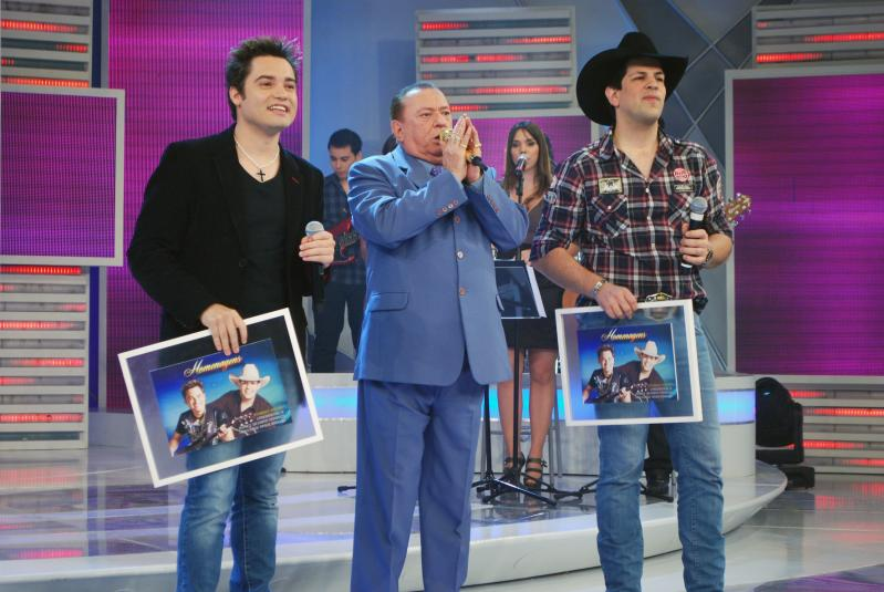 Fernando e Sorocaba recebendo homenagem de Raul Gil em 2010.